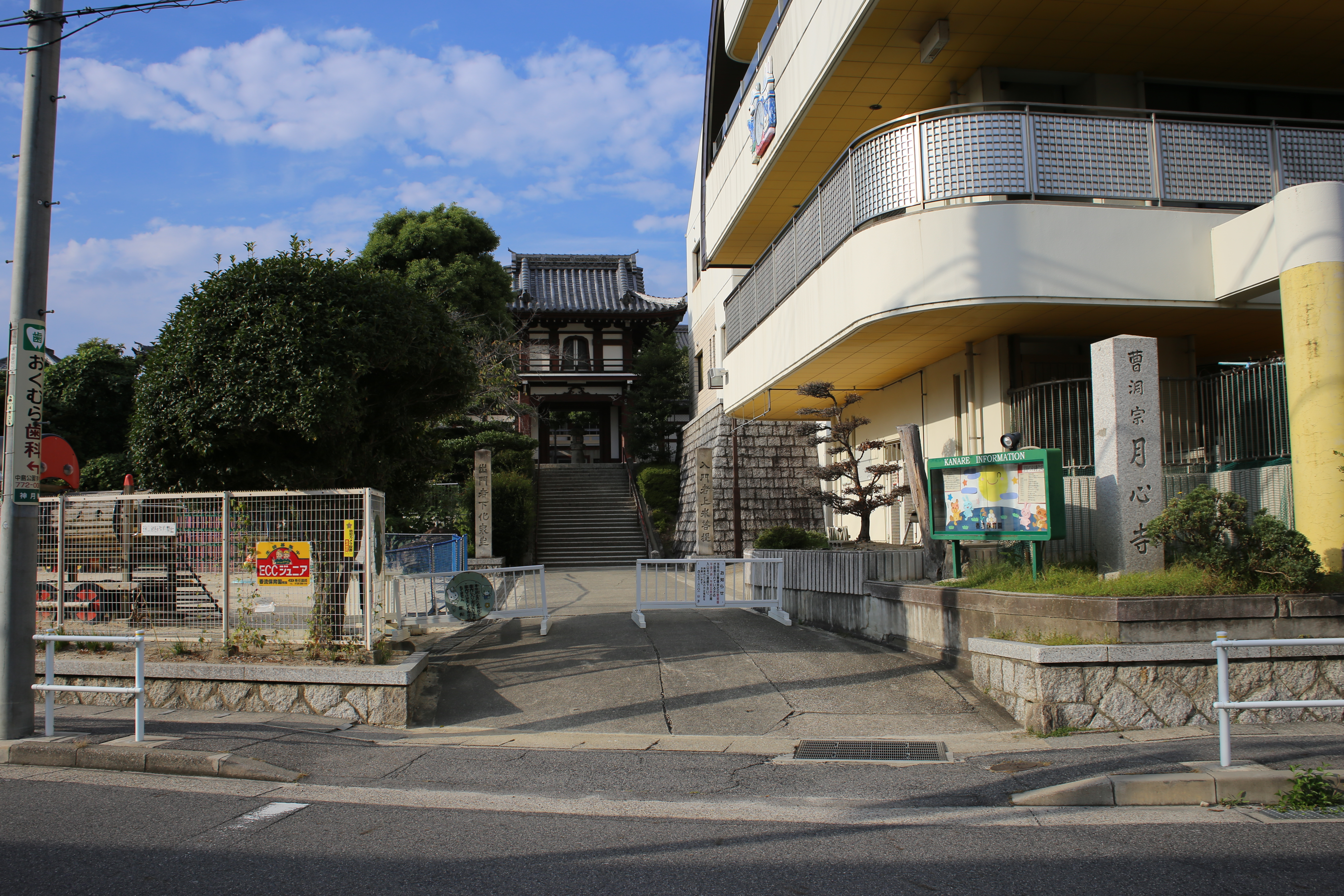 名古屋市名東区神月町の月心寺を南側公道より撮影